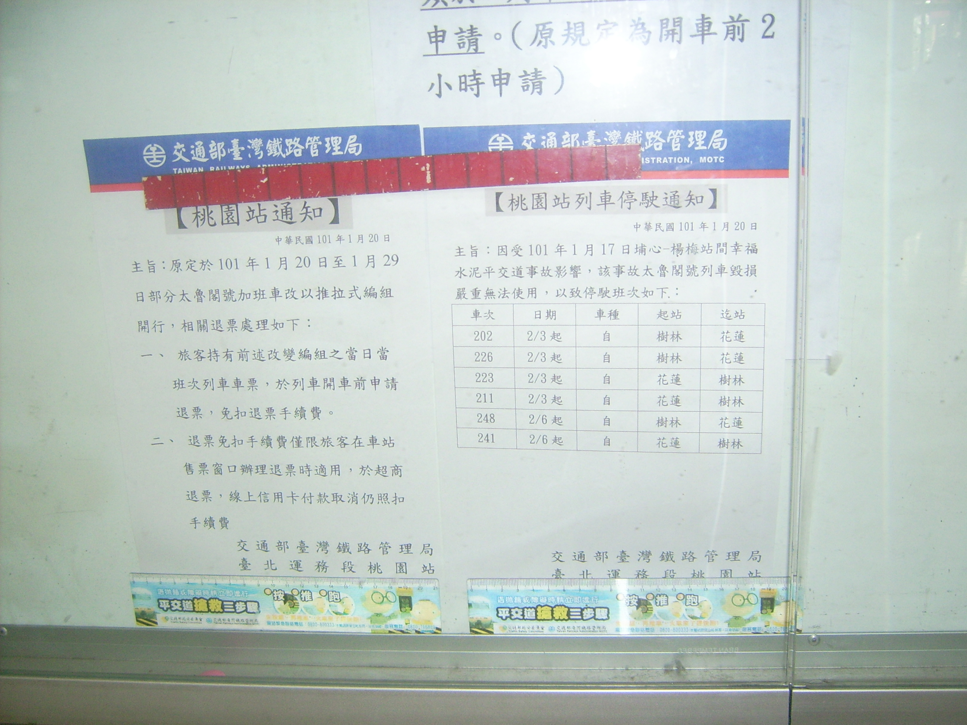 2012年1月20日，台铁桃园站于埔心事故后发布的列车停驶公告。